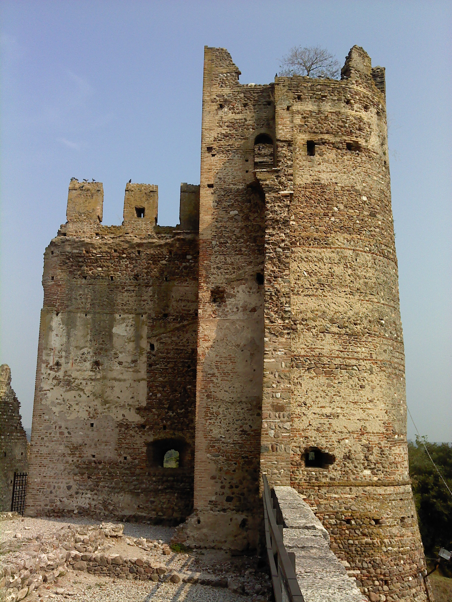 Castello Scaligero Valeggio Sul Mincio Verona Torre Tonda